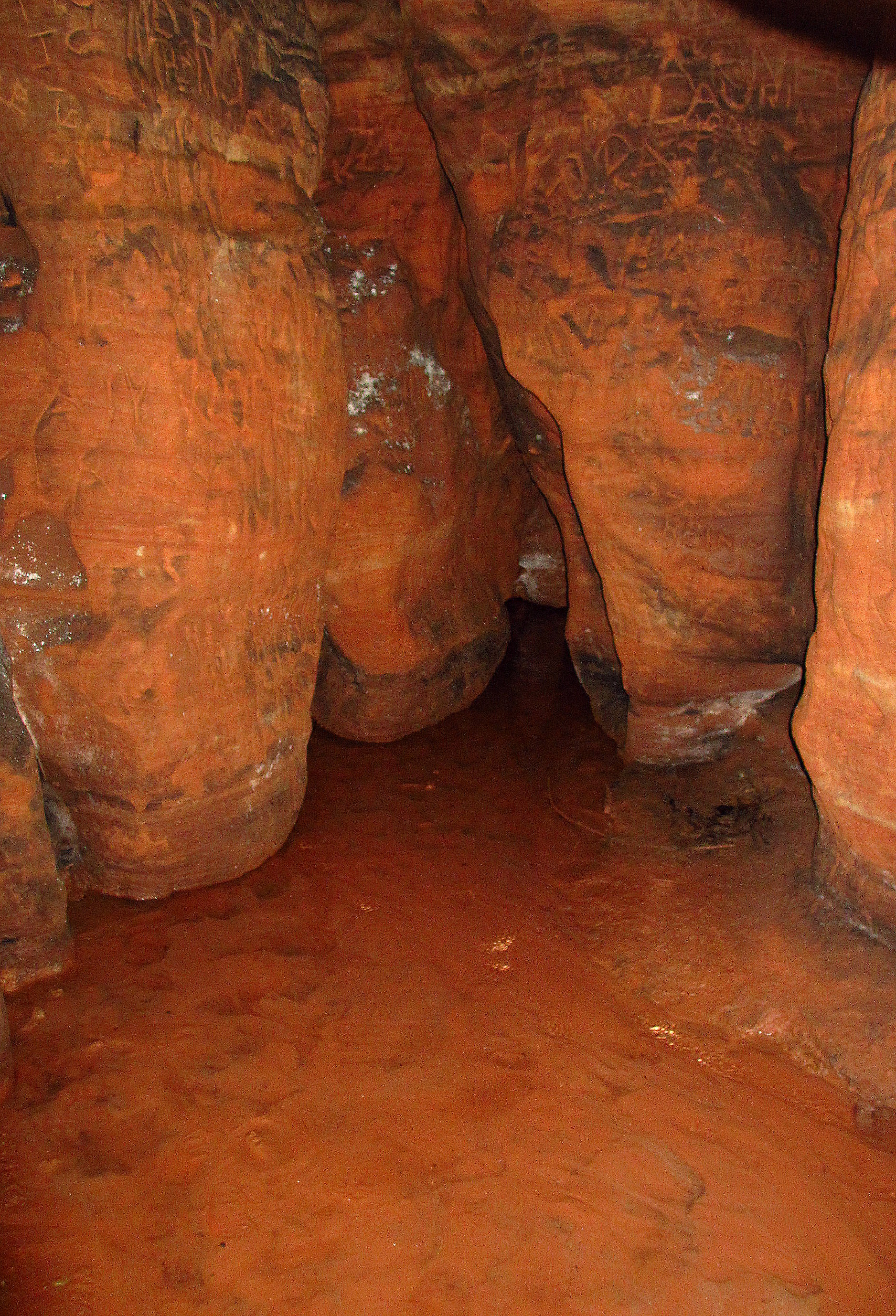 Allikukivi koopad Pärnumaal Kilingi-Nõmme lähistel